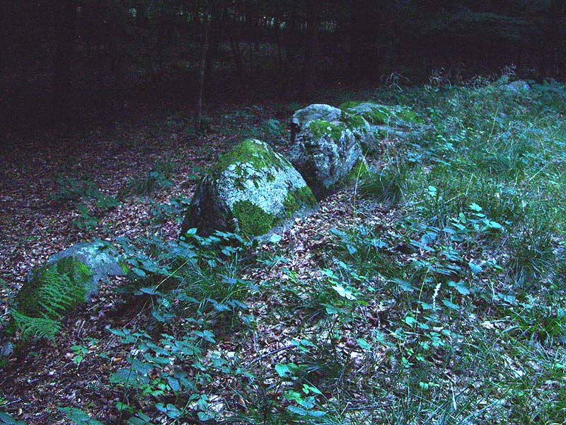 Großsteingrab Pinnesgrab